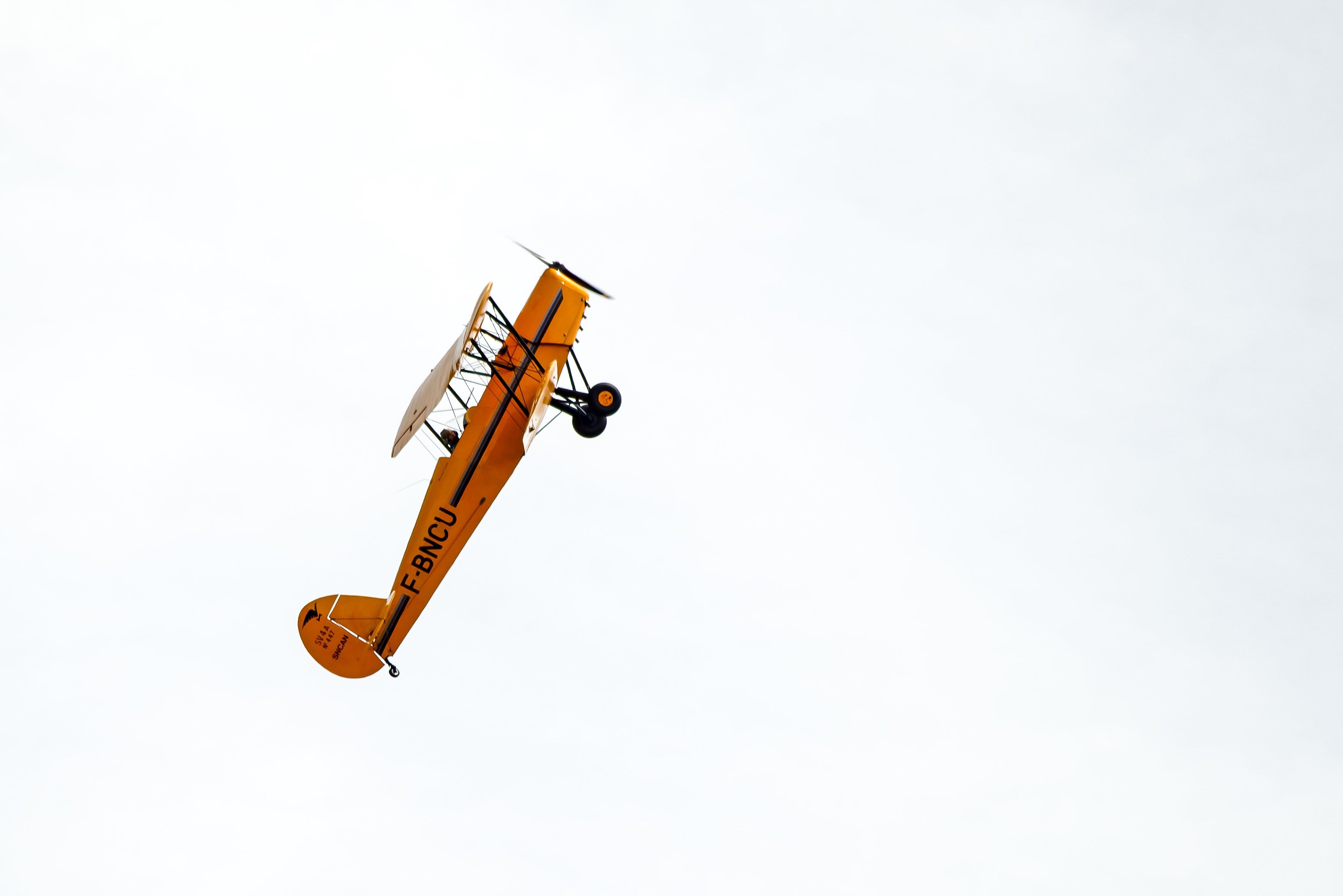 Biplan Stampe SV-4 A, lors du meeting aérien de clôture du championnat de France 2016 de voltige aérienne. Aérodrome de Dijon-Darois (Côte d'Or, Bourgogne-Franche-Comté, France).